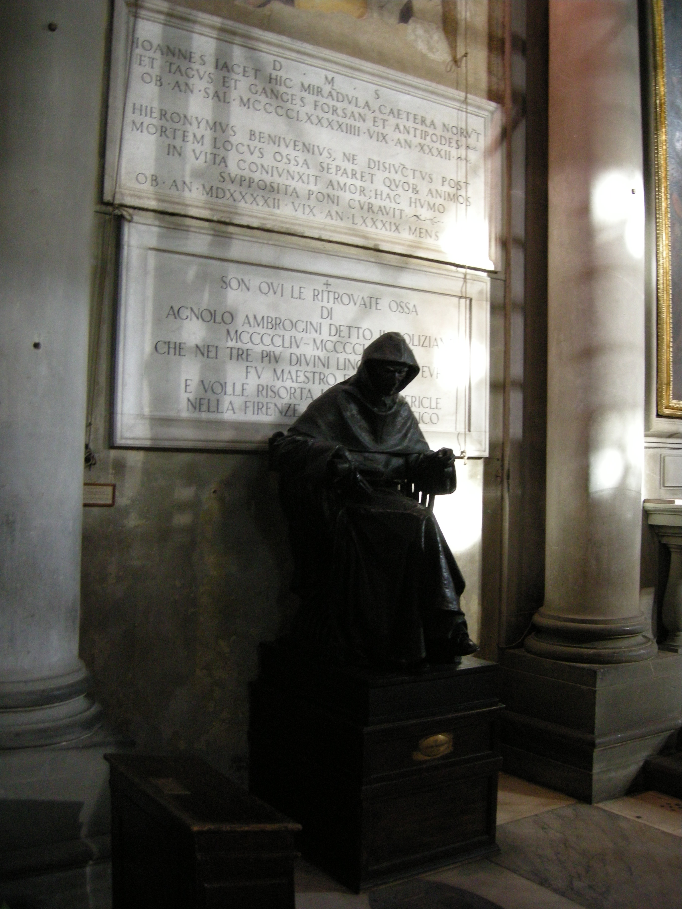 San marco, firenze, statua di savonarola